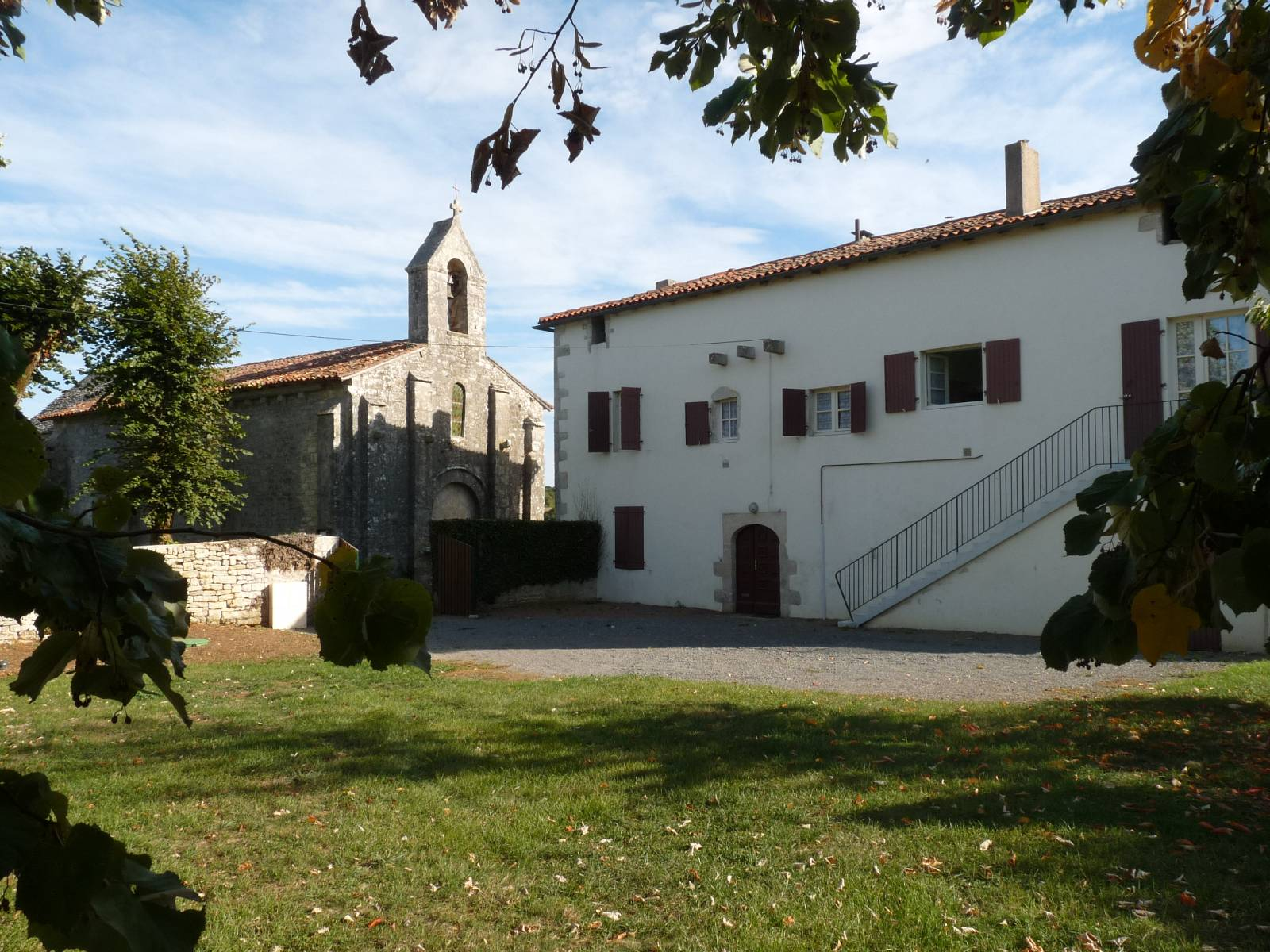 l'église et le gîte communal de Pougné, Charente, France (gîte rural communal: 3 appartements, à but touristique ou voyageurs (estivants ou passage))